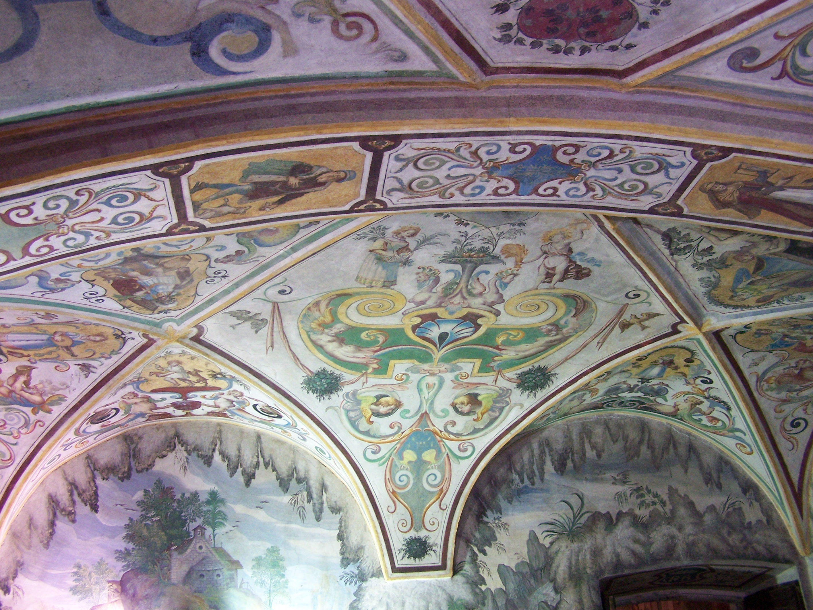 Affreschi cinquecenteschi nel palazzo antico di Villa Litta a Lainate (MI) - Italy